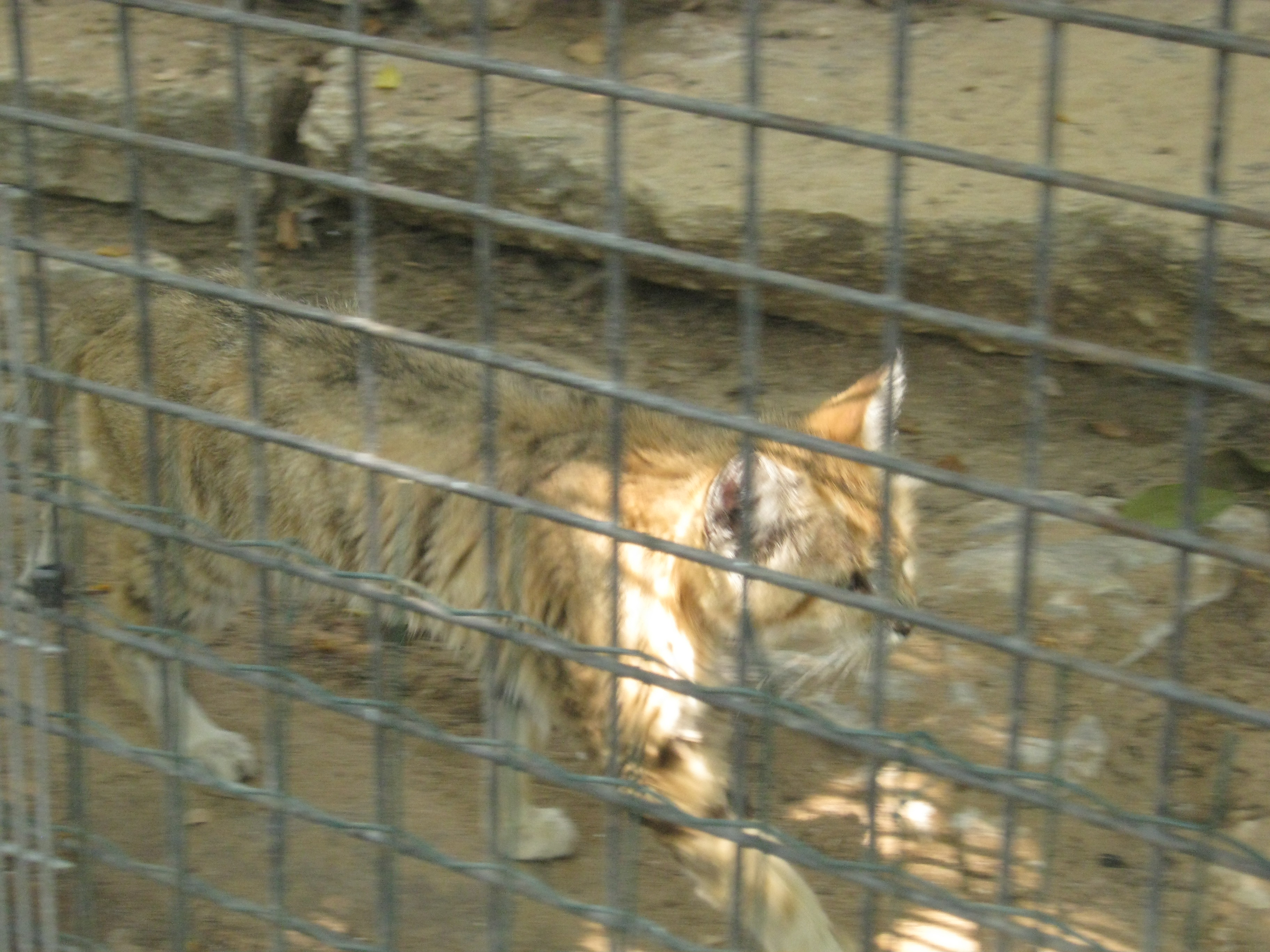 Felis margarita en el Centro zoológico de Tel Aviv-Ramat Gan